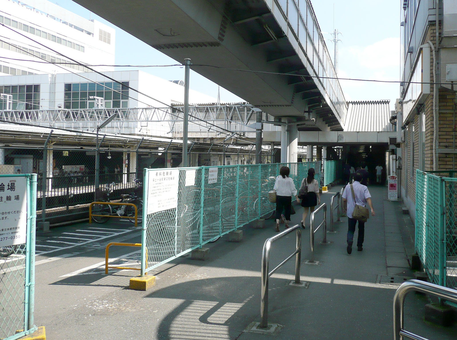 保土ヶ谷駅東口